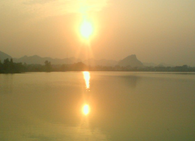 Dong Thai Lake